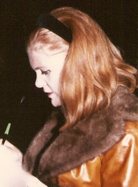 Anja Silja in Hamburg March 1968